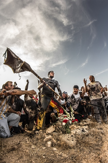 El Gobierno declara de Interés Turístico Internacional la fiesta de Cascamorras